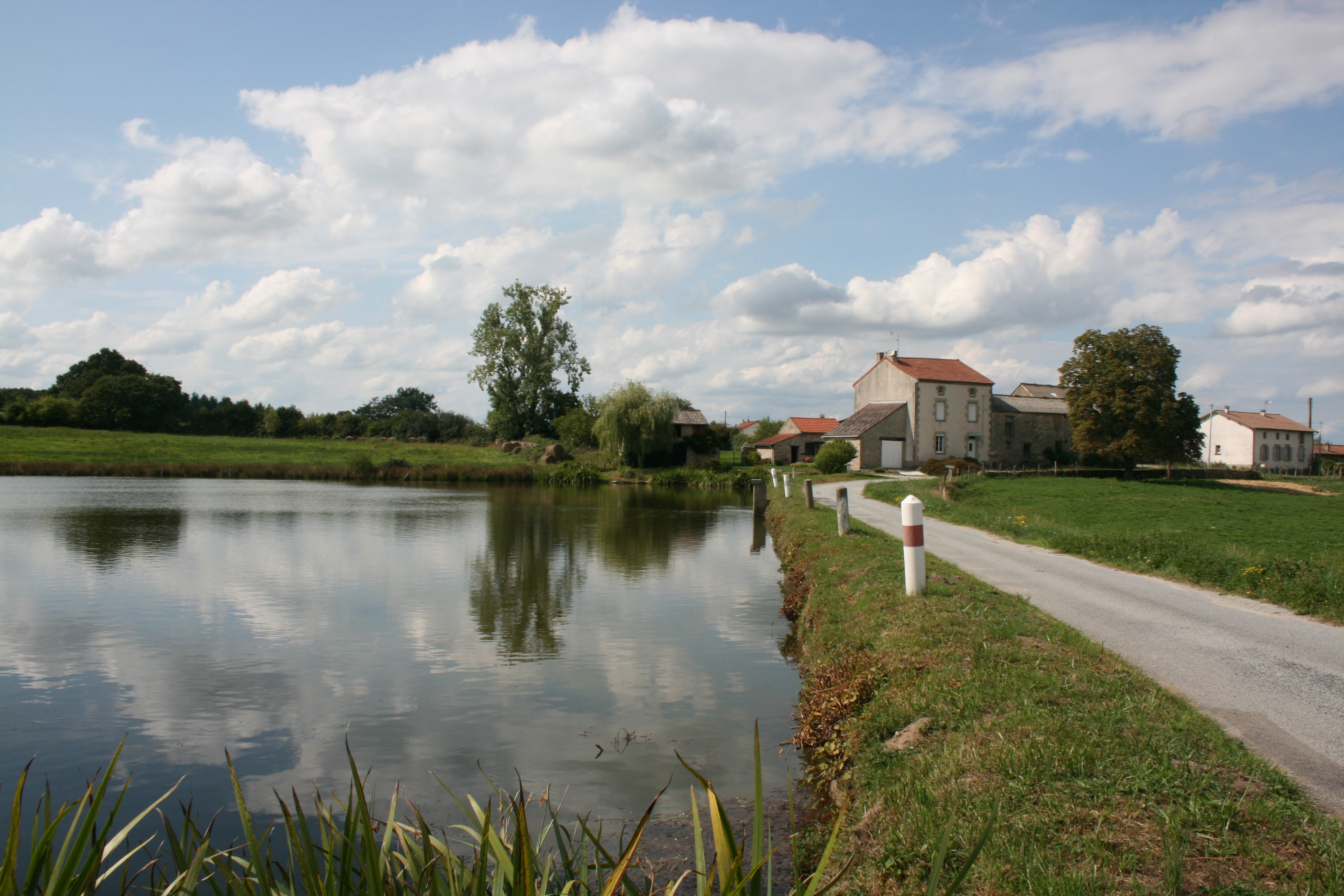 Petit village accolé au bourg de Saint-Sornin.